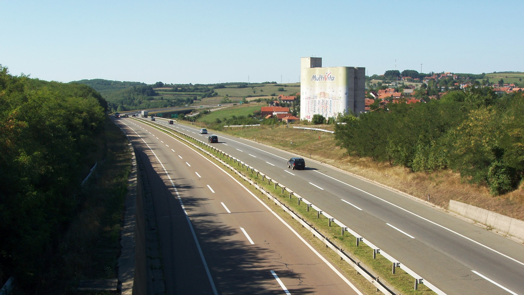 Аутопут БГ-НИ поред Ражња